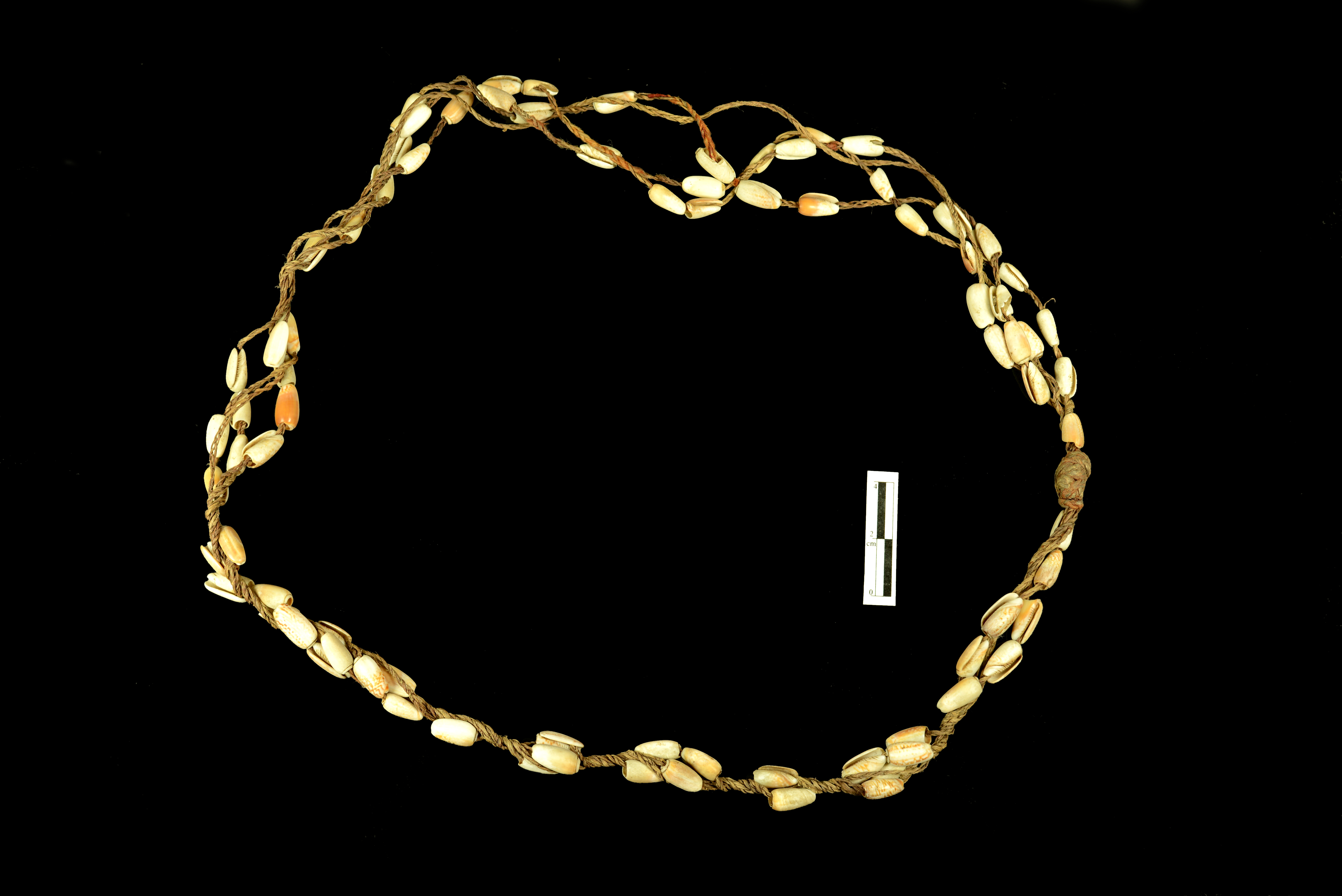 Kanak ovula shell necklace